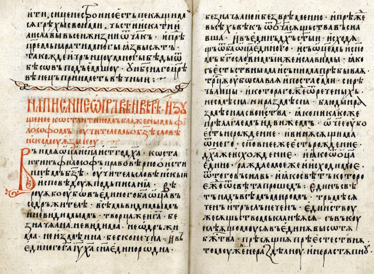 Лаврентиев сборник